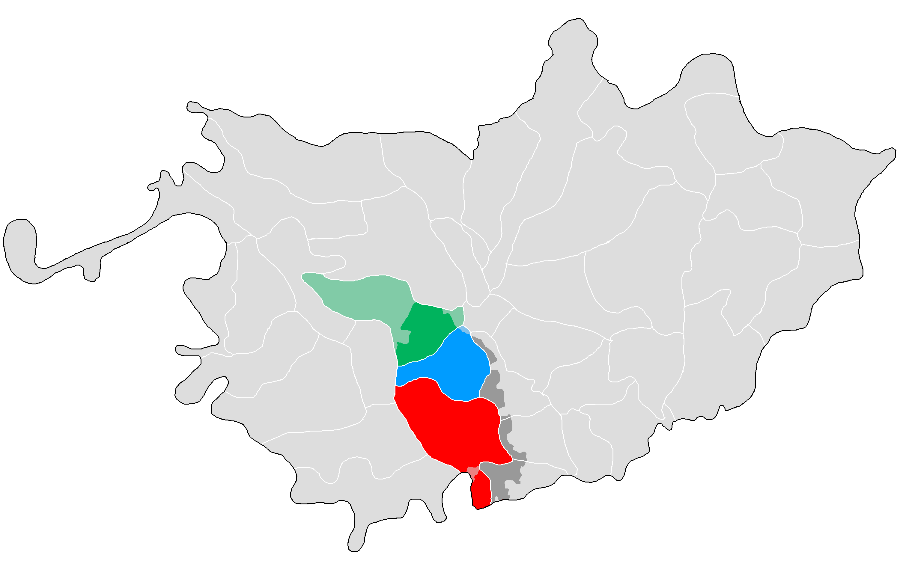 1825年的东平州地图。上色者为今新湖镇分属的三个保。 智明保 爱礼保 约礼保 今属新湖镇管辖的其他地区 东平州其他地区